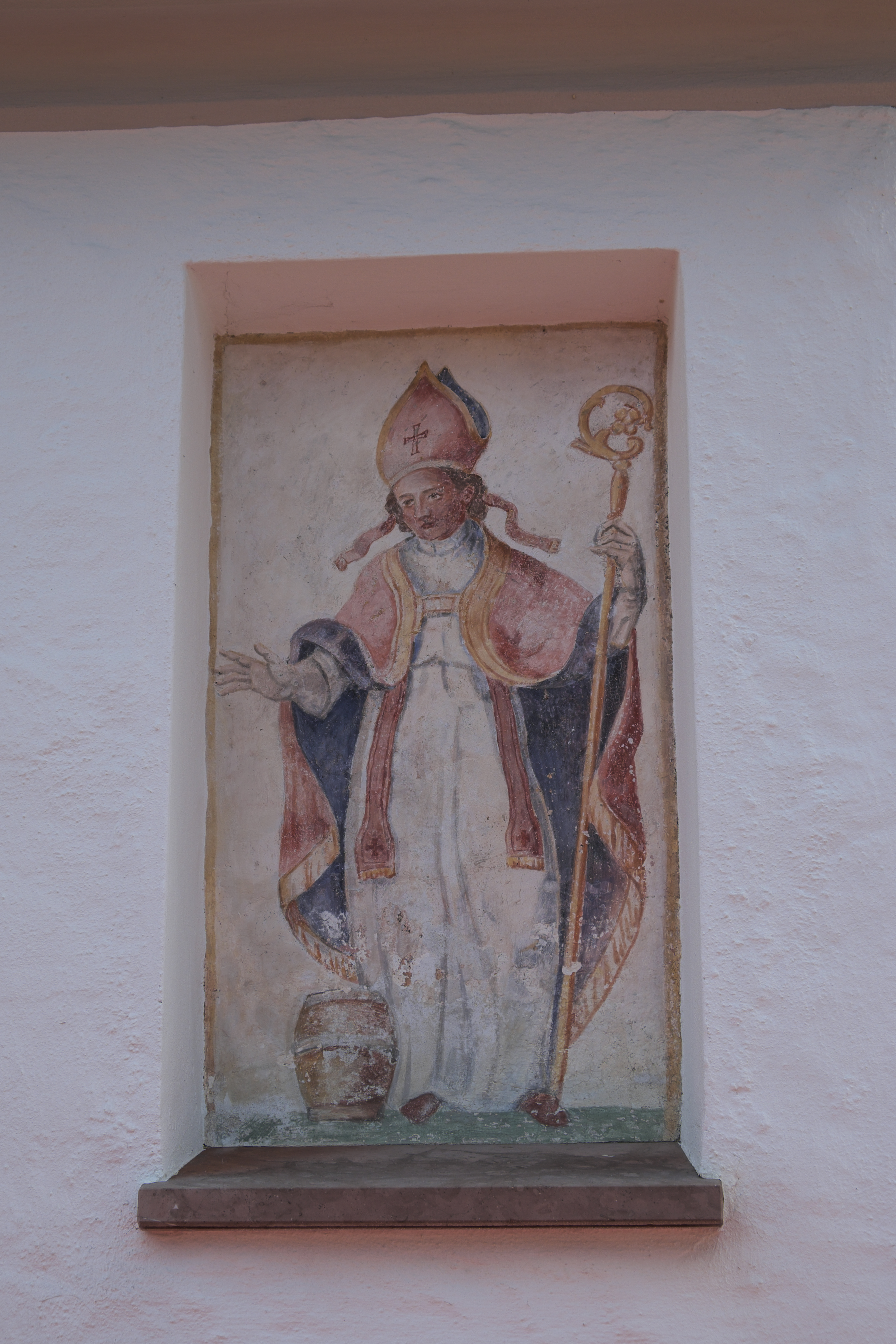 Katholische Filialkirche St. Rupertus in Gaden (Waging am See) im Landkreis Traunstein (Bayern/Deutschland), Bischof, Malerei an der Vorhalle